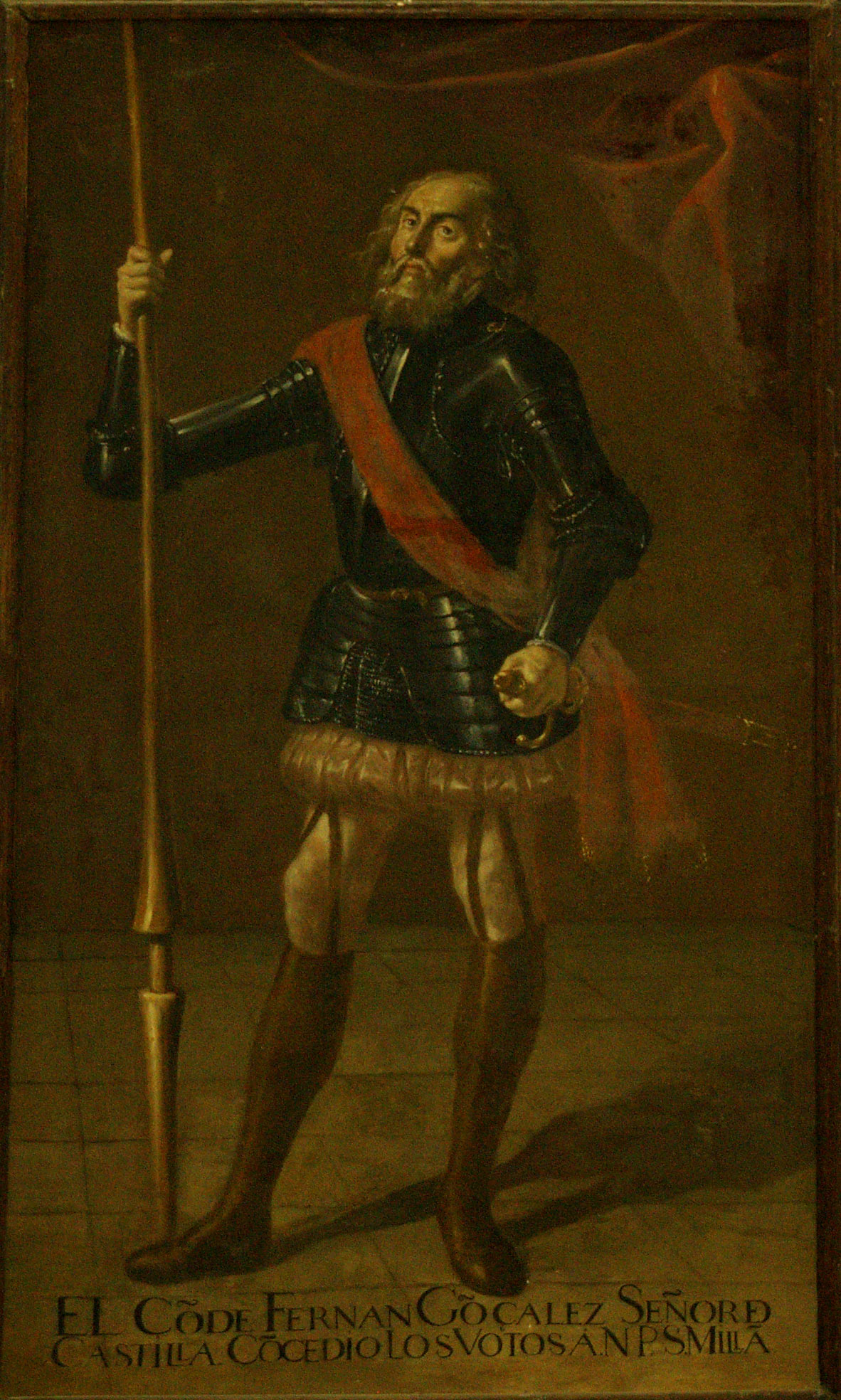 Retrato de Fernán González (c.910 - 970), Señor de Castilla